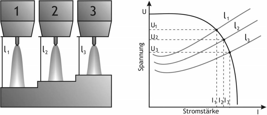 Lichtbogenkennlinien